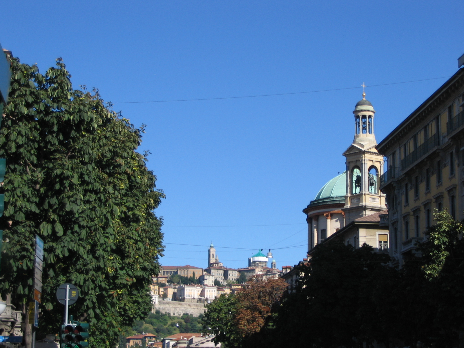 Autore Giorces. Bergamo, Città Alta dal Sentierone